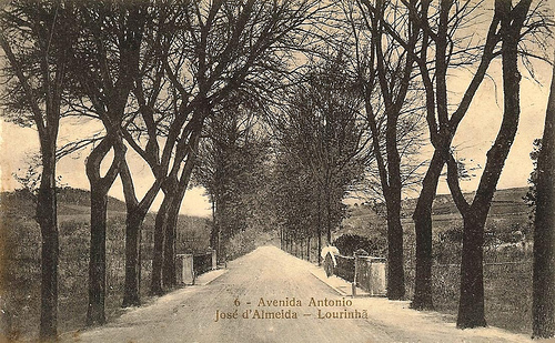 Avenida António José de Almeida – Lourinhã, Outubro de 1914